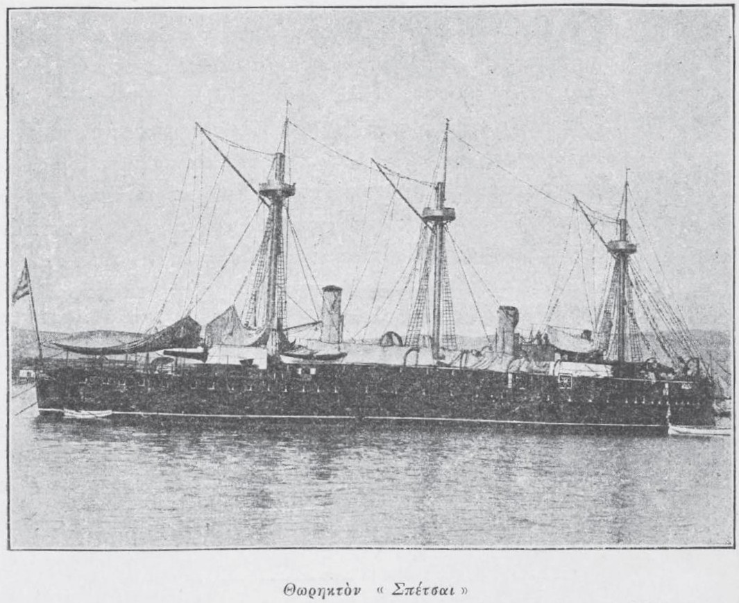 Σπέτσαι (θωρηκτό) Griechischer Kanonenträger.